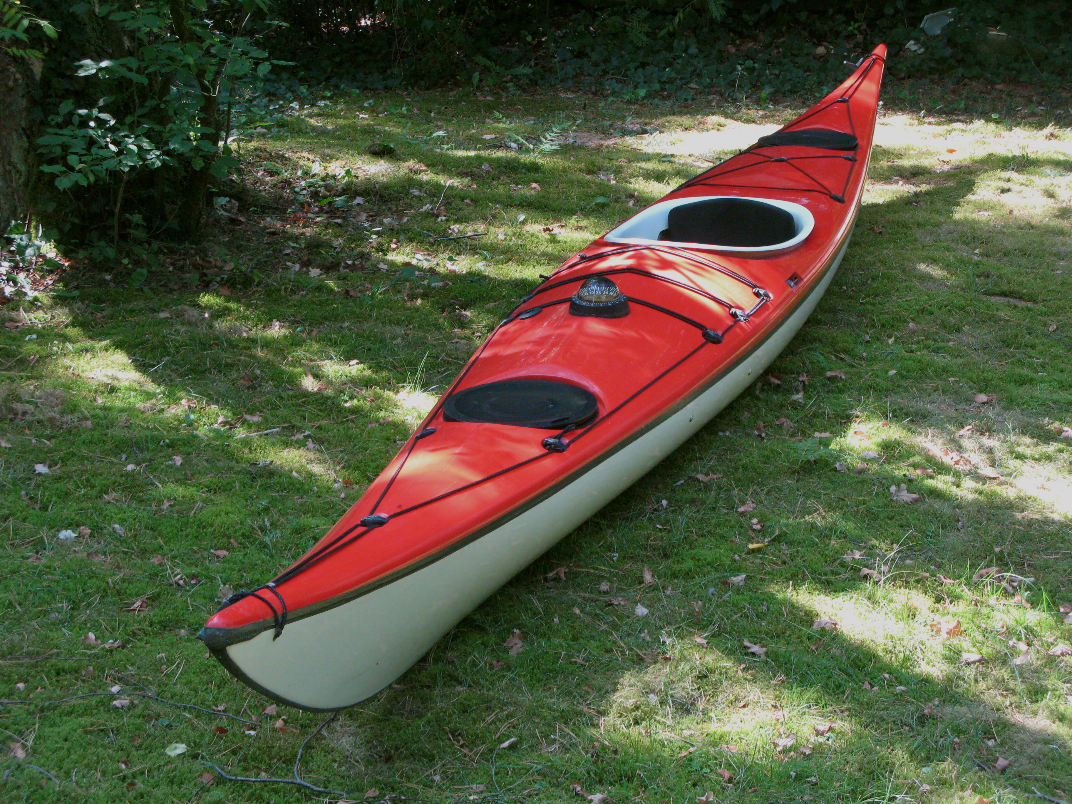 Seekajak - ganze Ansicht